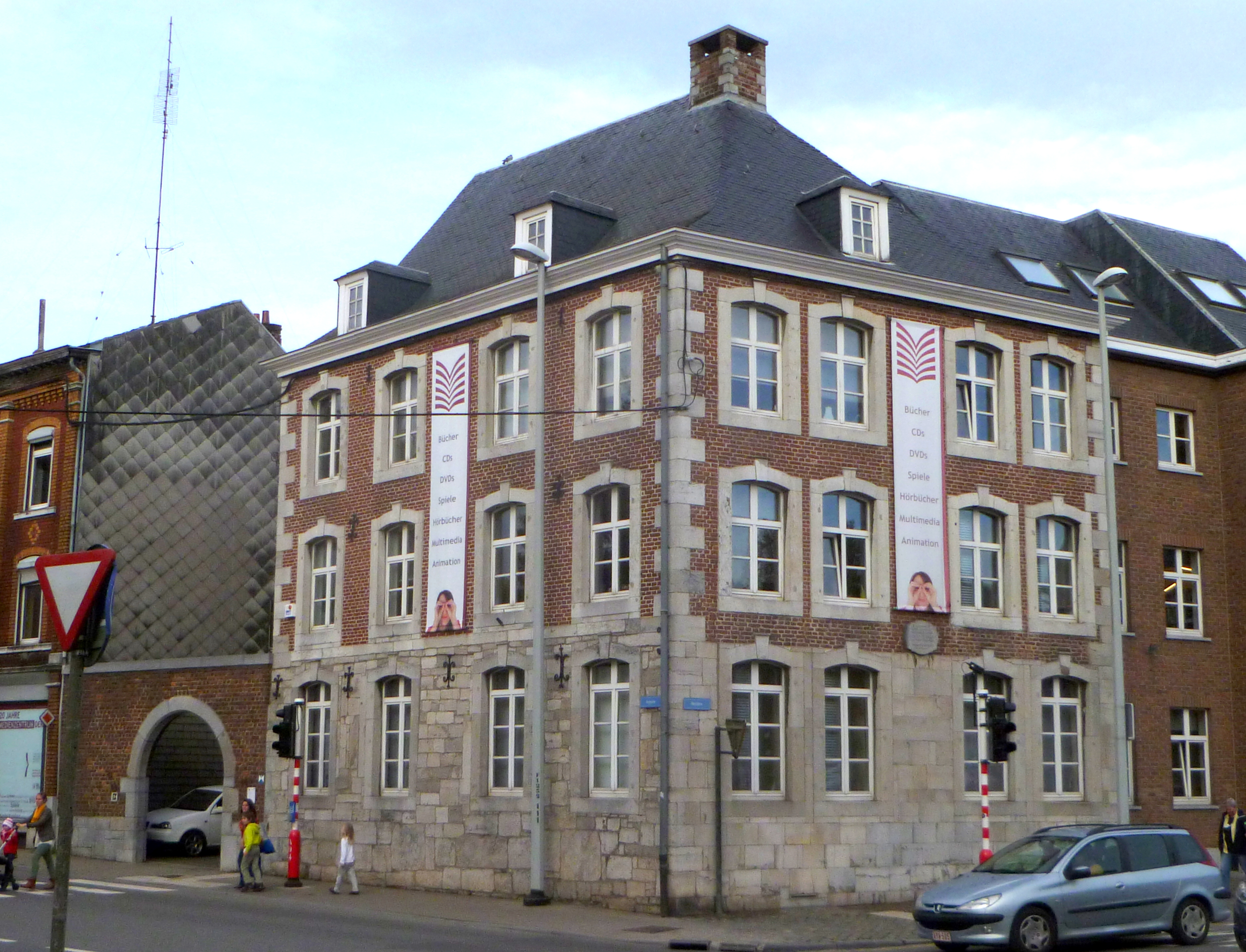 Baudenkmal in Eupen - Haus Tonnar, Geburtshaus des Brauermeisters und Mundartdichters August Tonnat (1827-1909)